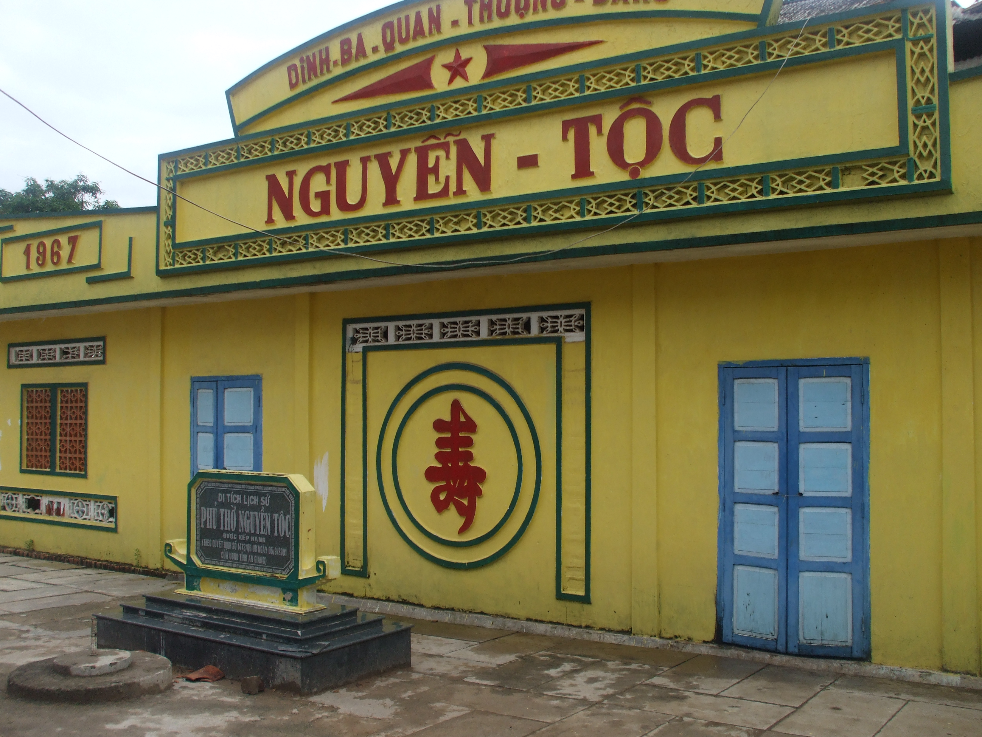 Phủ thờ Nguyễn tộc tại cù lao Giêng, thuộc huyện Chợ Mới, An Giang, Việt Nam.